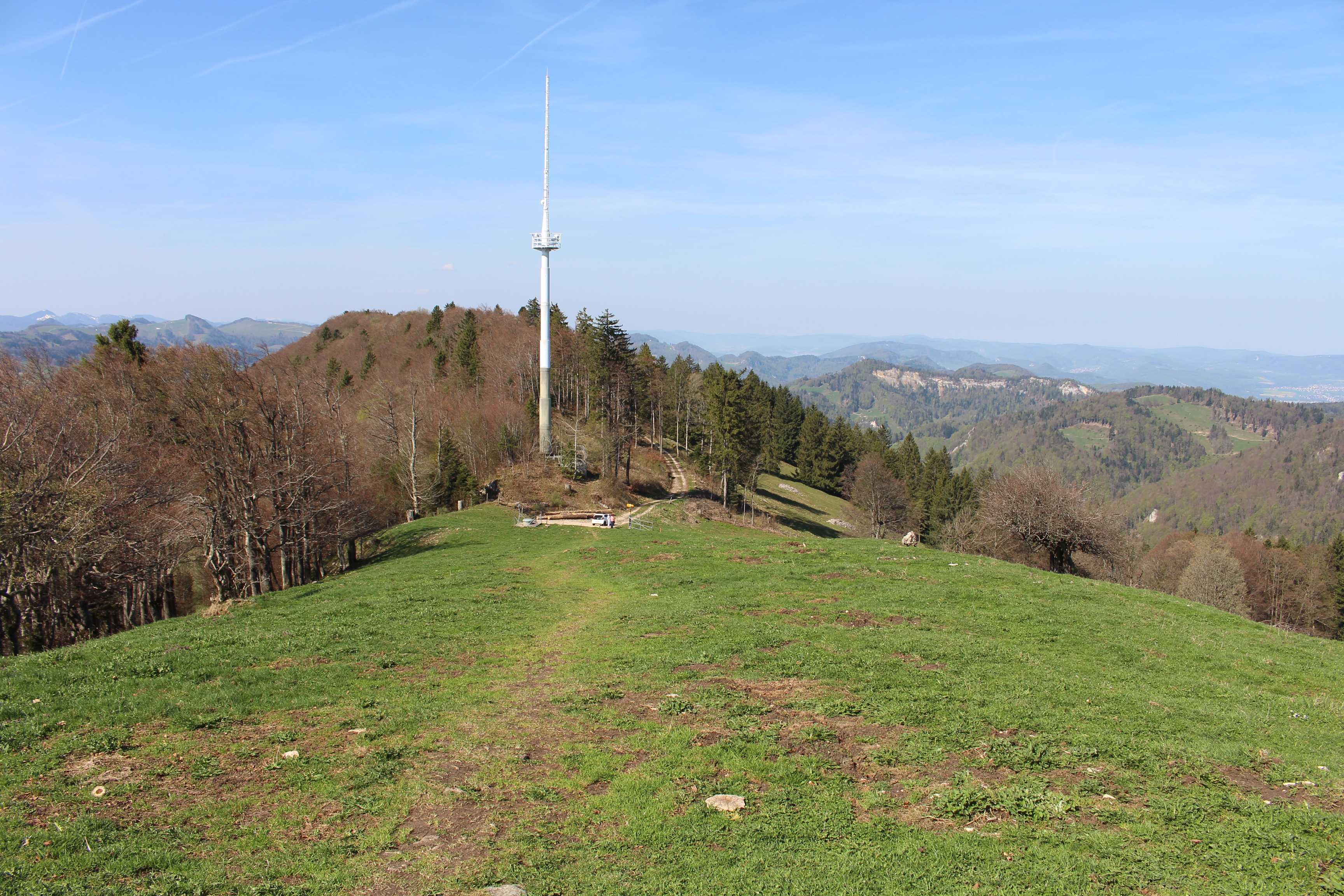 Zwischen Passwang (Antenne) (1164 m.ü.M.) und Vogelberg (1204 m.ü.M.) im Solothurner Jura.